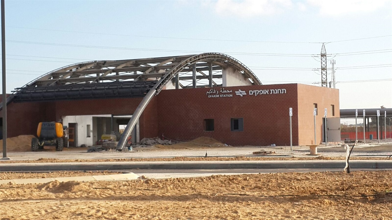 תחנת הרכבת אופקים בבנייה